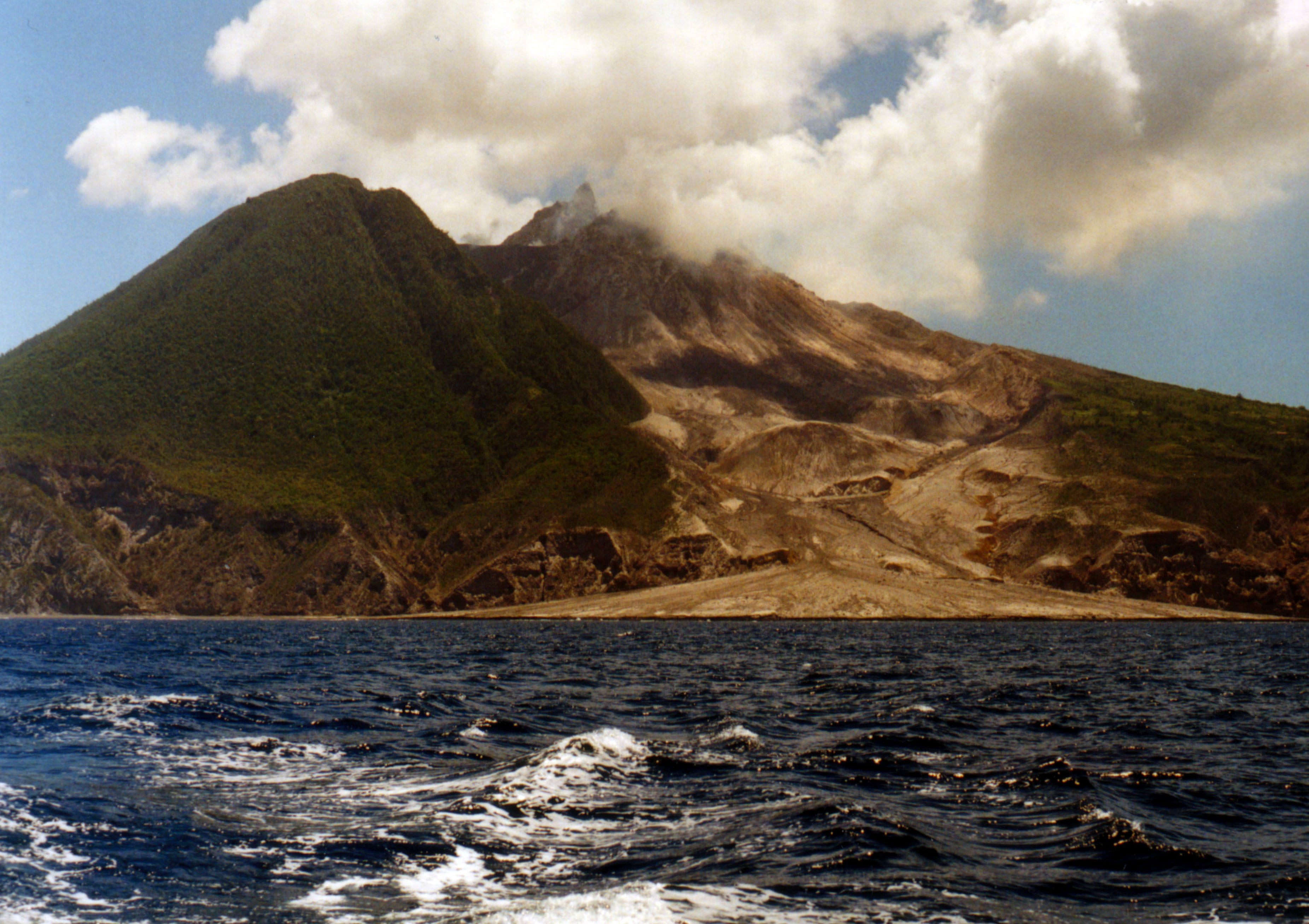 Vulkan Soufriere Hills mit Lavastrom, Blick von Süden